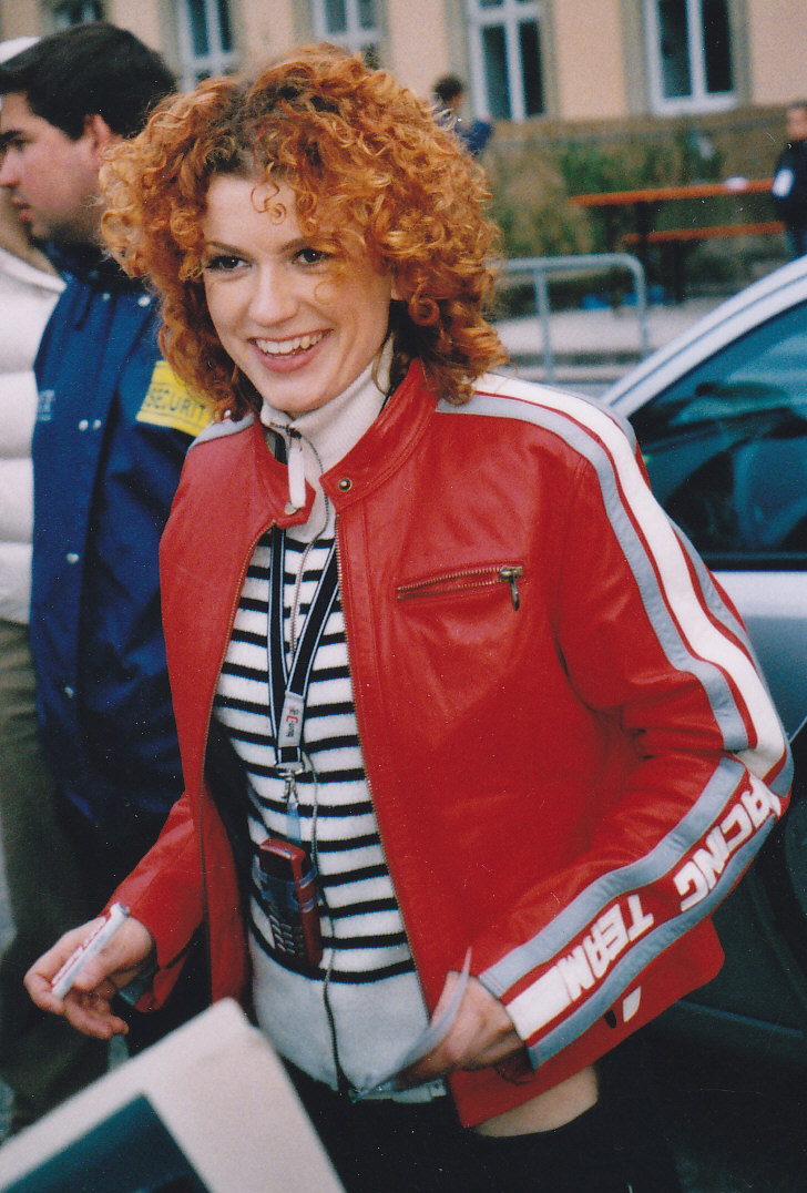 Lucy von den No Angels